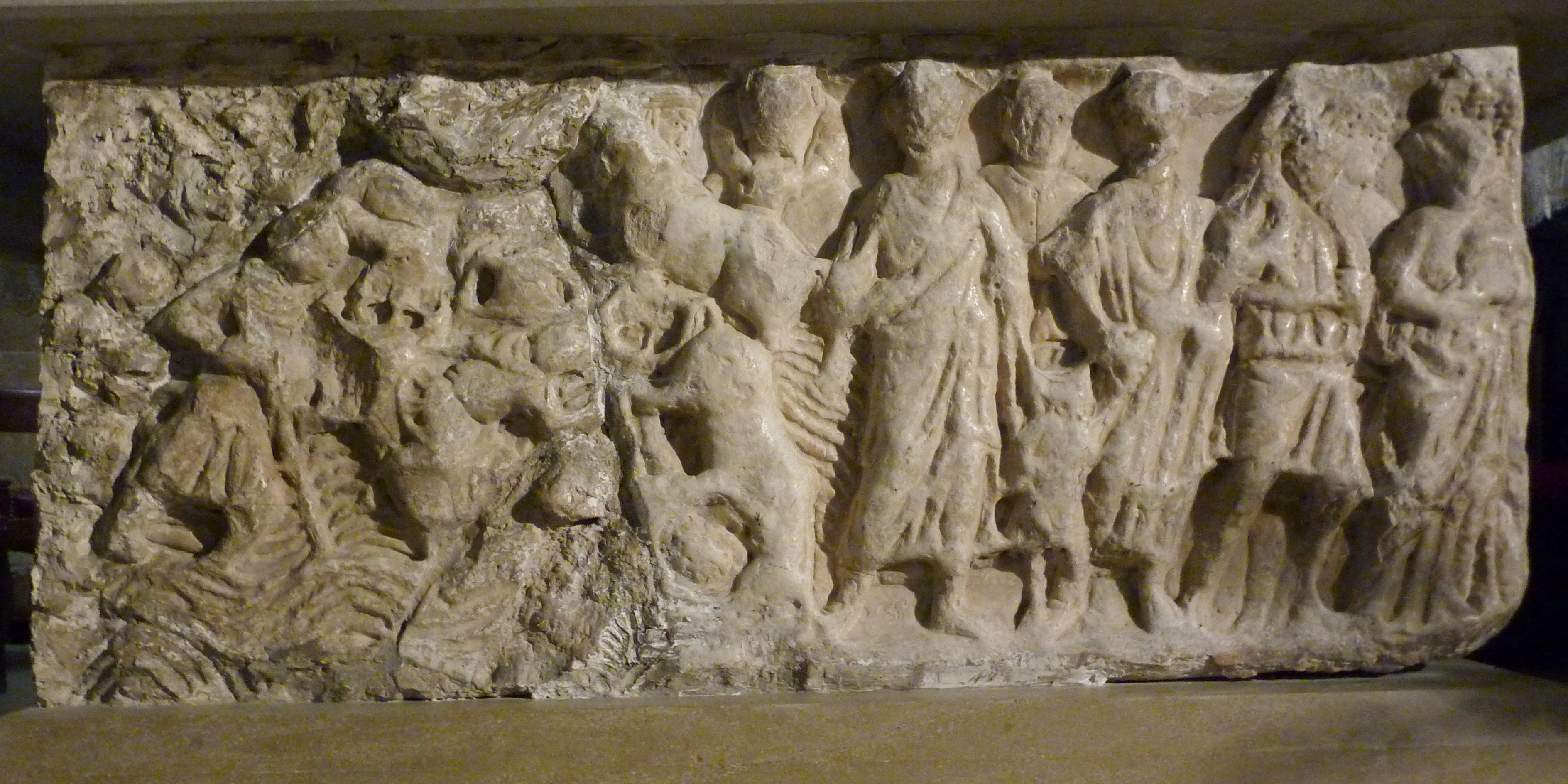 Altar der katholischen Pfarrkirche Notre-Dame-de-l'Assomption in Moustiers-Sainte-Marie, einer Gemeinde im Département Alpes-de-Haute-Provence in der französischen Region Provence-Alpes-Côte d'Azur; gallo-römischer Sarkophag